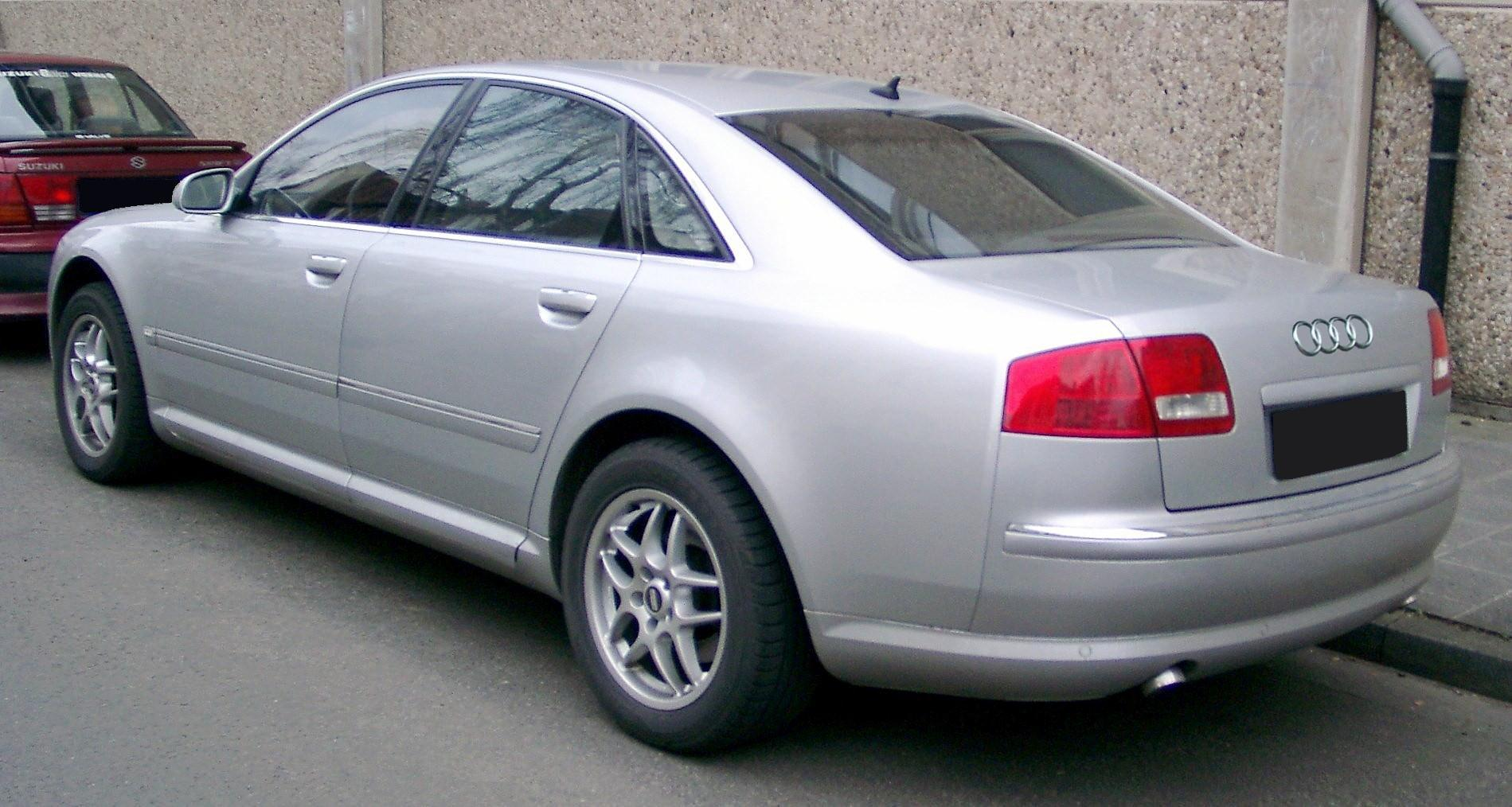 Audi A8